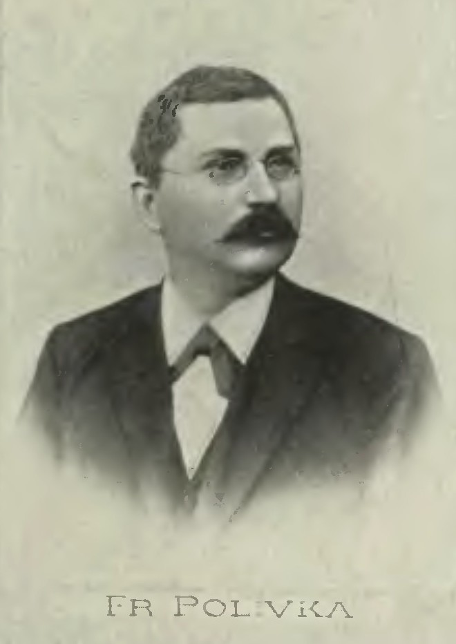 Portrét – František Polívka (1860 - 1923), Český botanik.